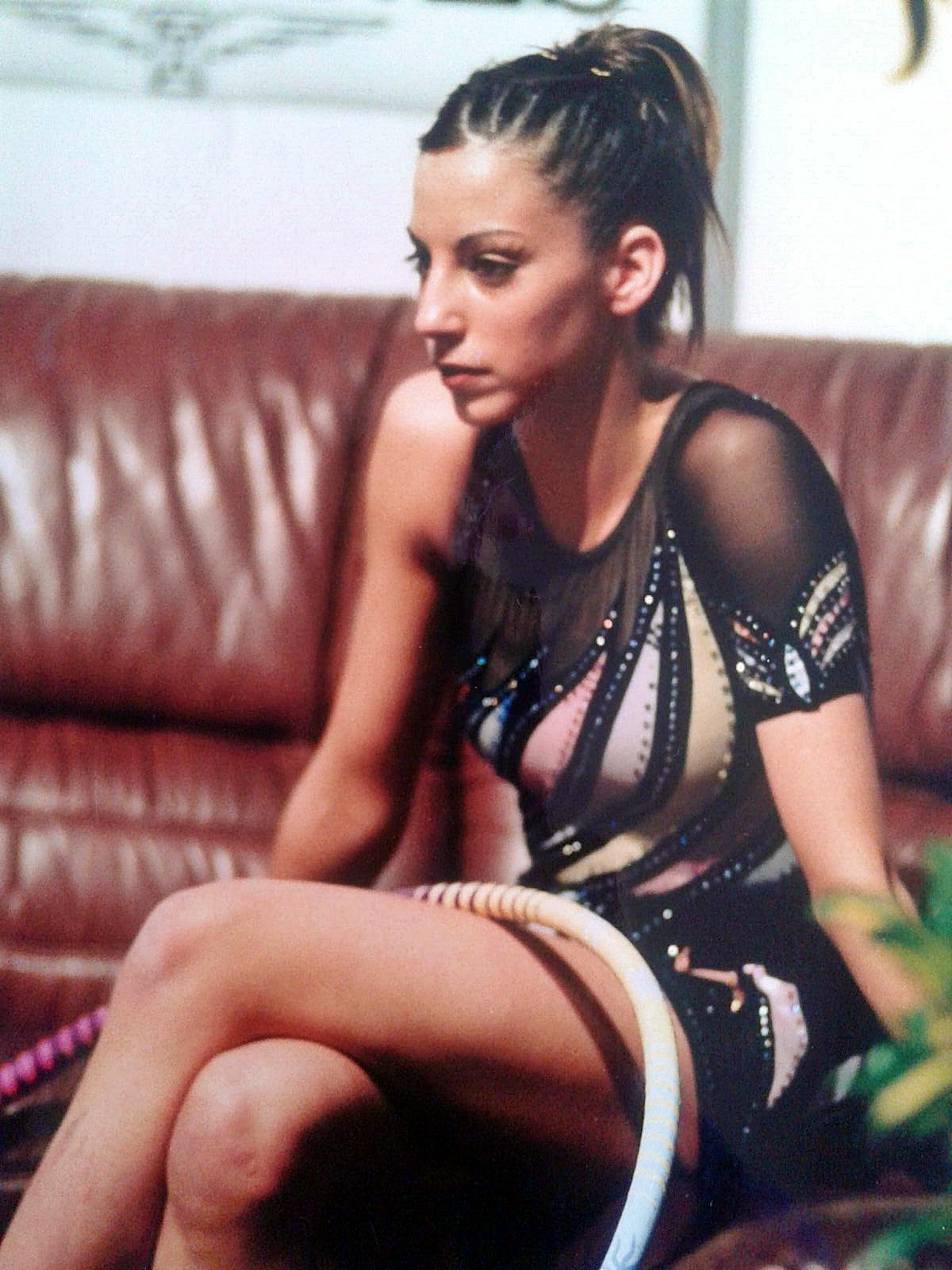 La gimnasta española Almudena Cid en el Campeonato de Europa de Gimnasia Rítmica de Riesa en 2003.